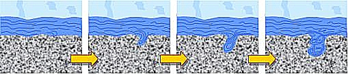 Grafik zur Entstehung von Gletschertöpfen